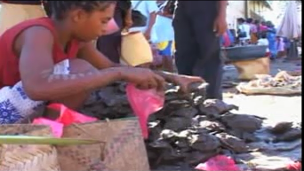 Crabe d'Antsohihy